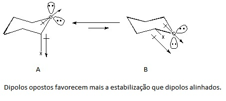 Efeito_dipolo